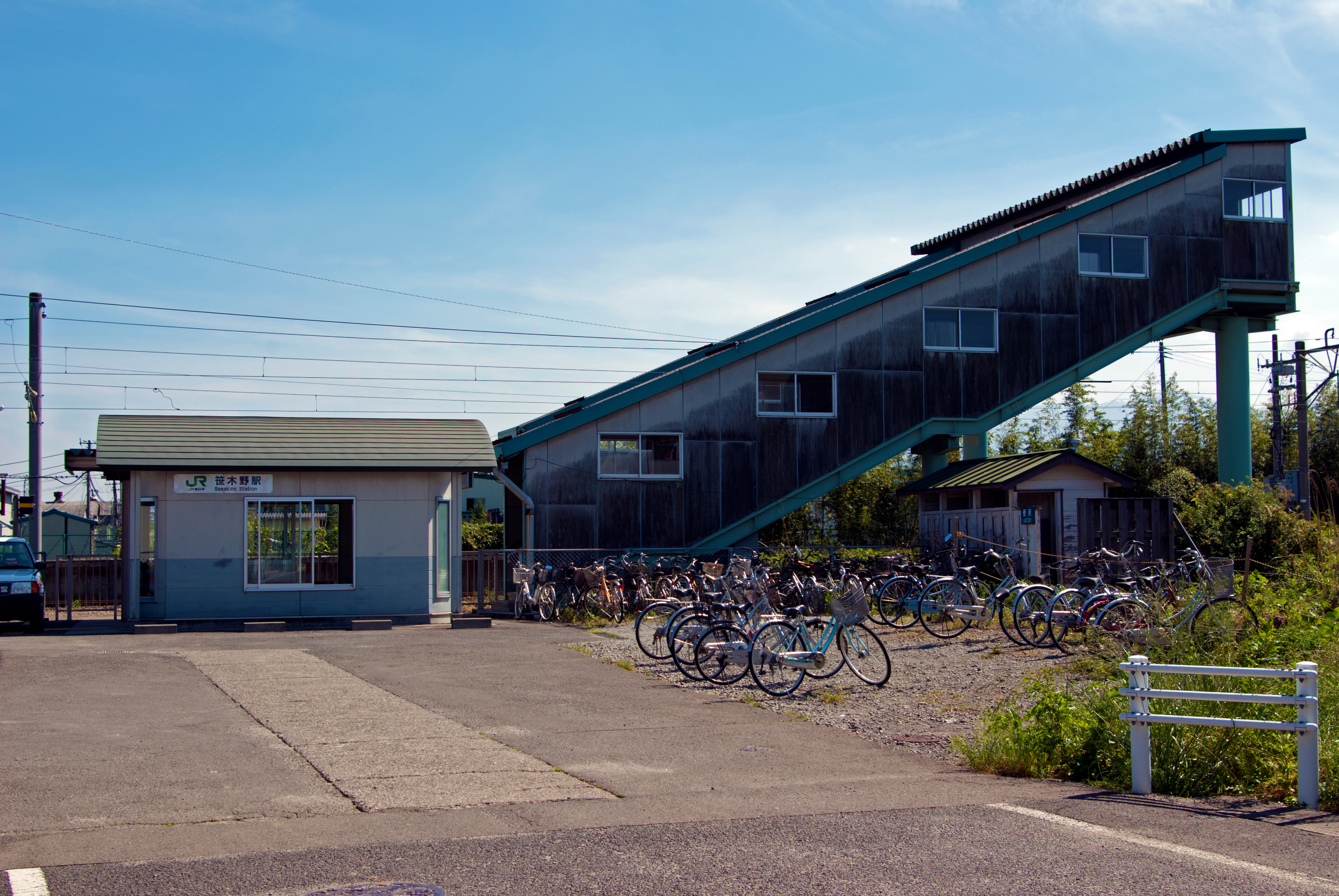 東日本旅客鉄道株式会社奥羽本線笹木野駅